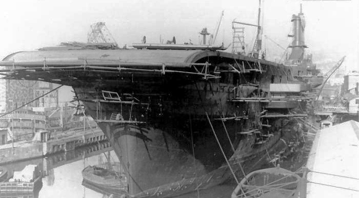 La didascalia della foto dice: l'ex piroscafo passeggeri Augustus della Società di Navigazione Italia nel porto di Genova durante i lavori di trasformazione nella portaerei Falco poi ribattezzata Sparviero e mai entrata in servizio; osservando il ponte di volo che si prolunga fino ad estrema poppa e si tratta di una immagine del transatlantico Roma durante i lavori di trasformazione in portaerei Aquila, in quanto nella portaerei Sparviero il ponte di volo non giungeva a poppa estema e nella foto si vede l'isola sul lato di dritta che sulla portaerei Sparviero non è mai stata realizzata